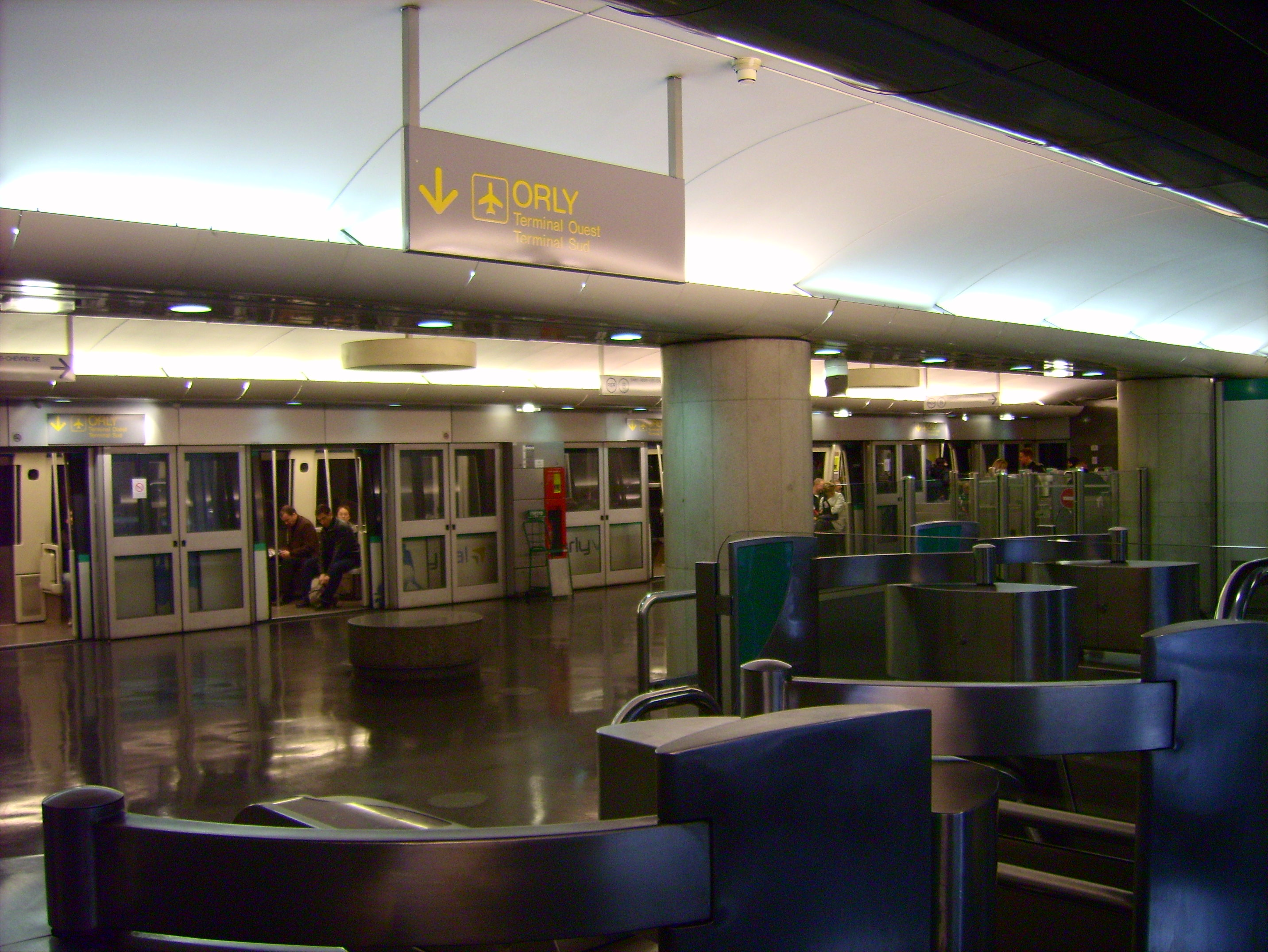 Quai Orlyval en gare d'Antony